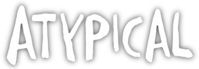 Título da série Atypical